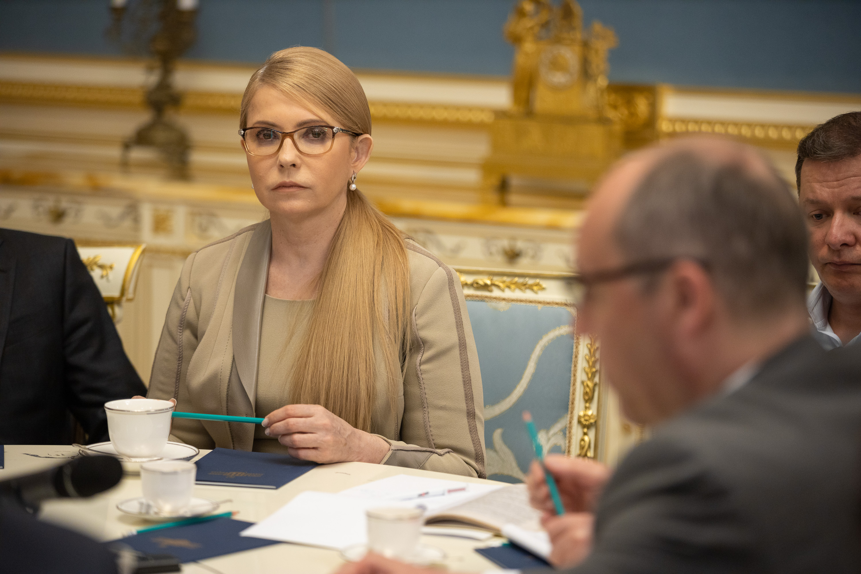 Встреча Зеленского с руководством ВРУ